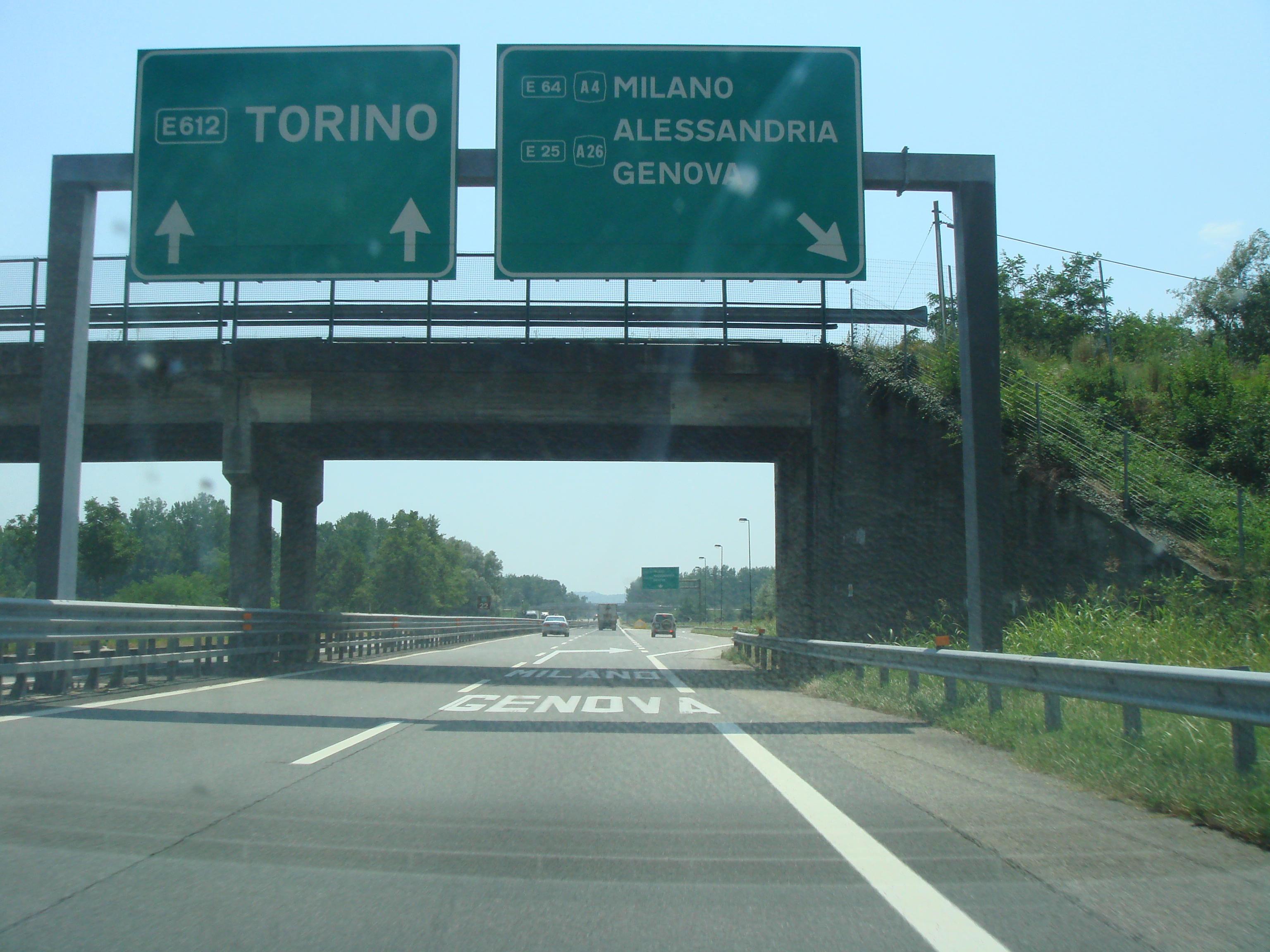 Vue de l'autoroute E612 au niveau d'Ivrea